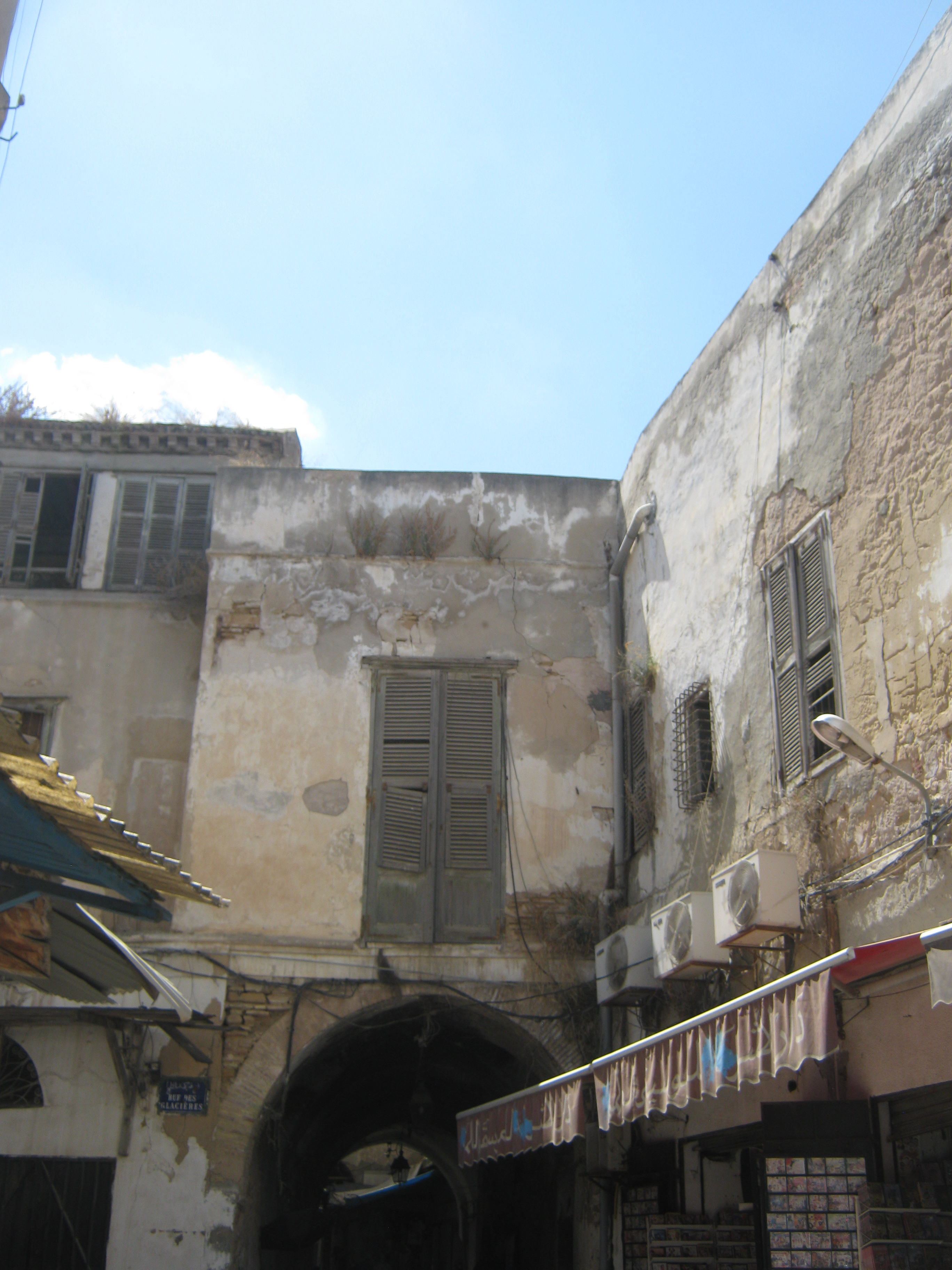 Rue Zarkoun